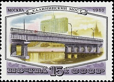 Почтовая марка СССР. Калининский мост. Номер в каталоге ЦФА 5143